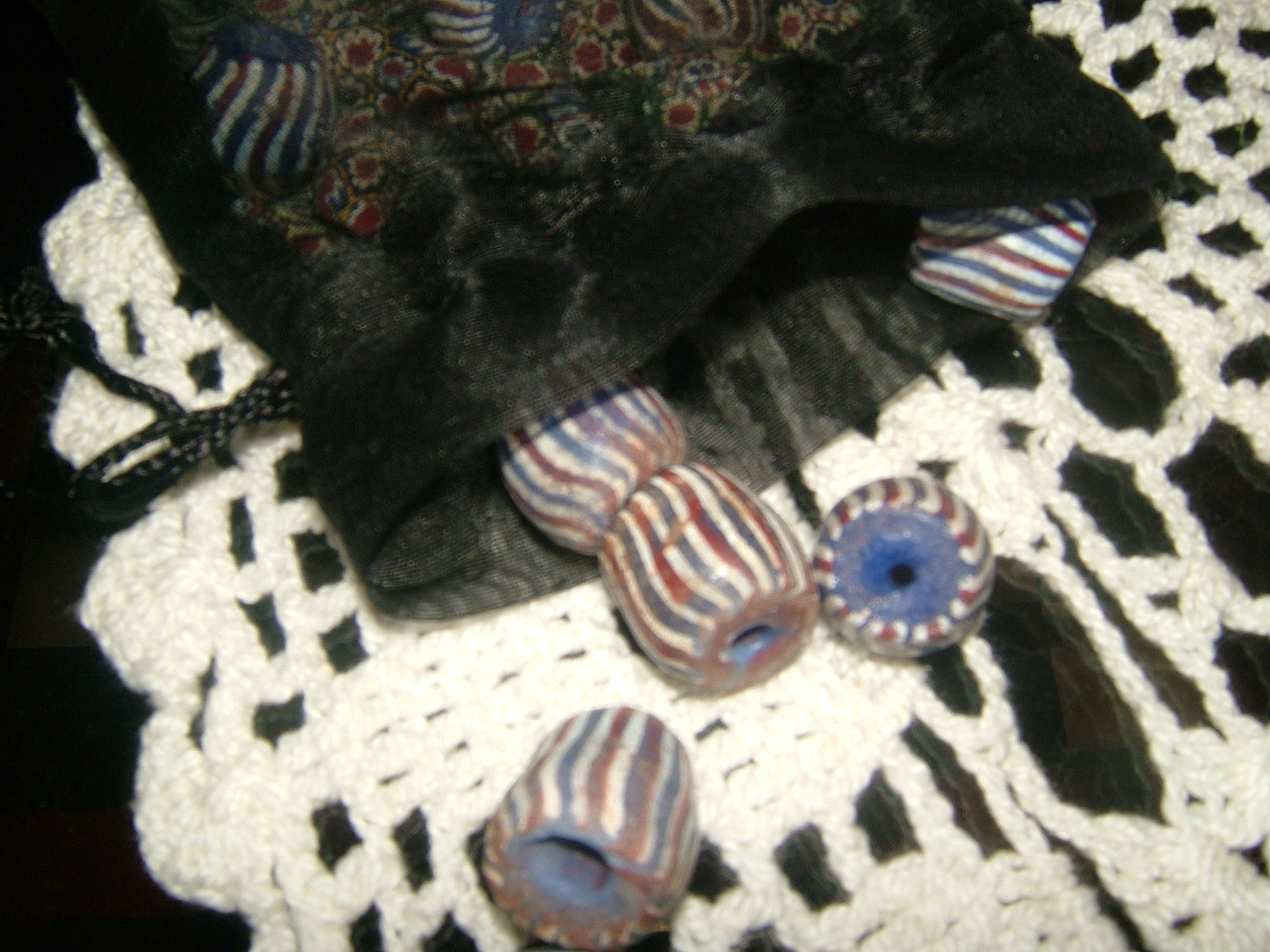 Perles de traite en pâte de verre 18ème